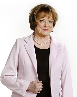 Cecilia Hagen krönikör på Expressen